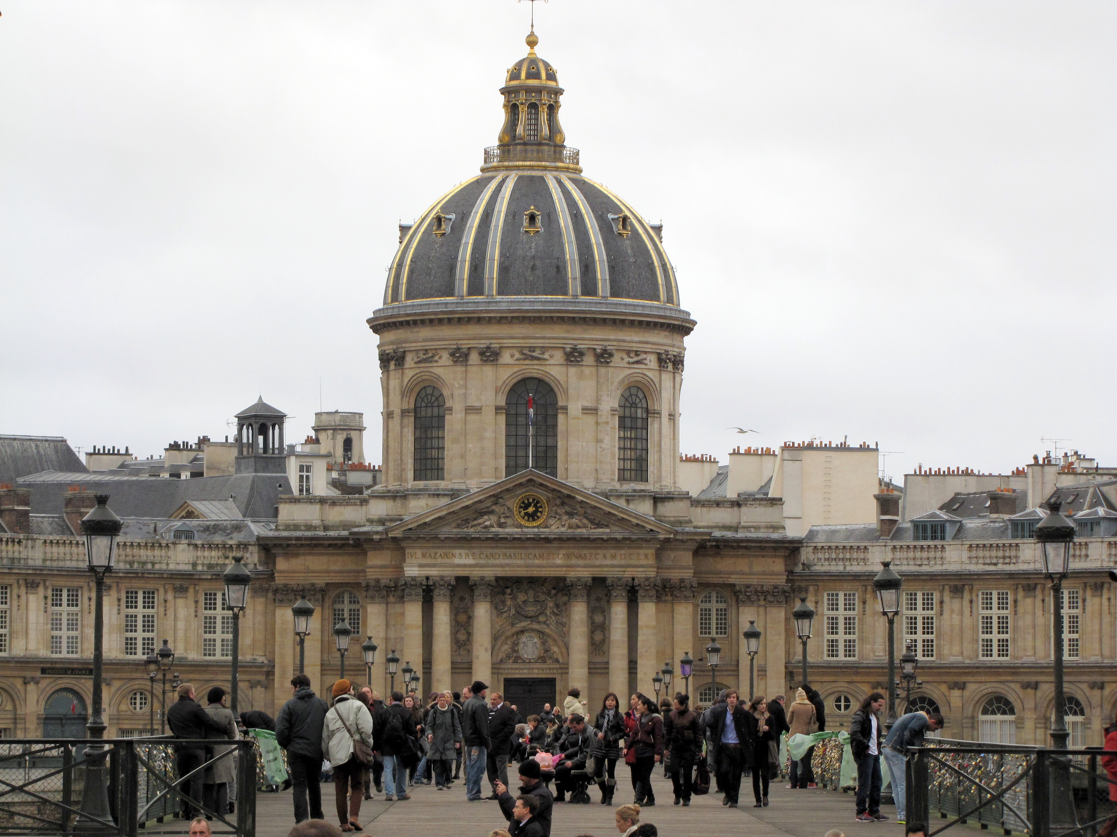 Париж